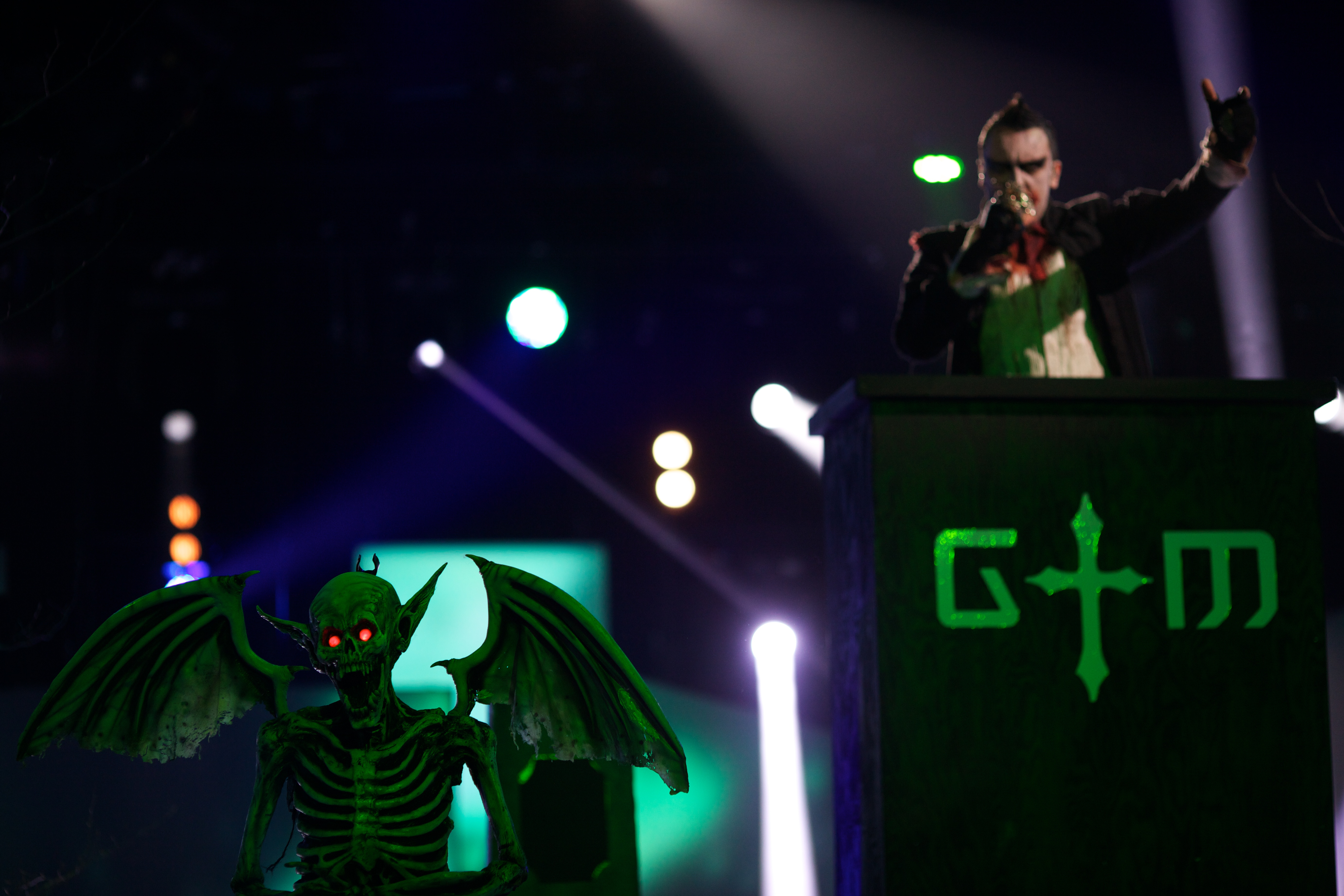 Melodi Grand Prix 2013 delfinale i Larvik